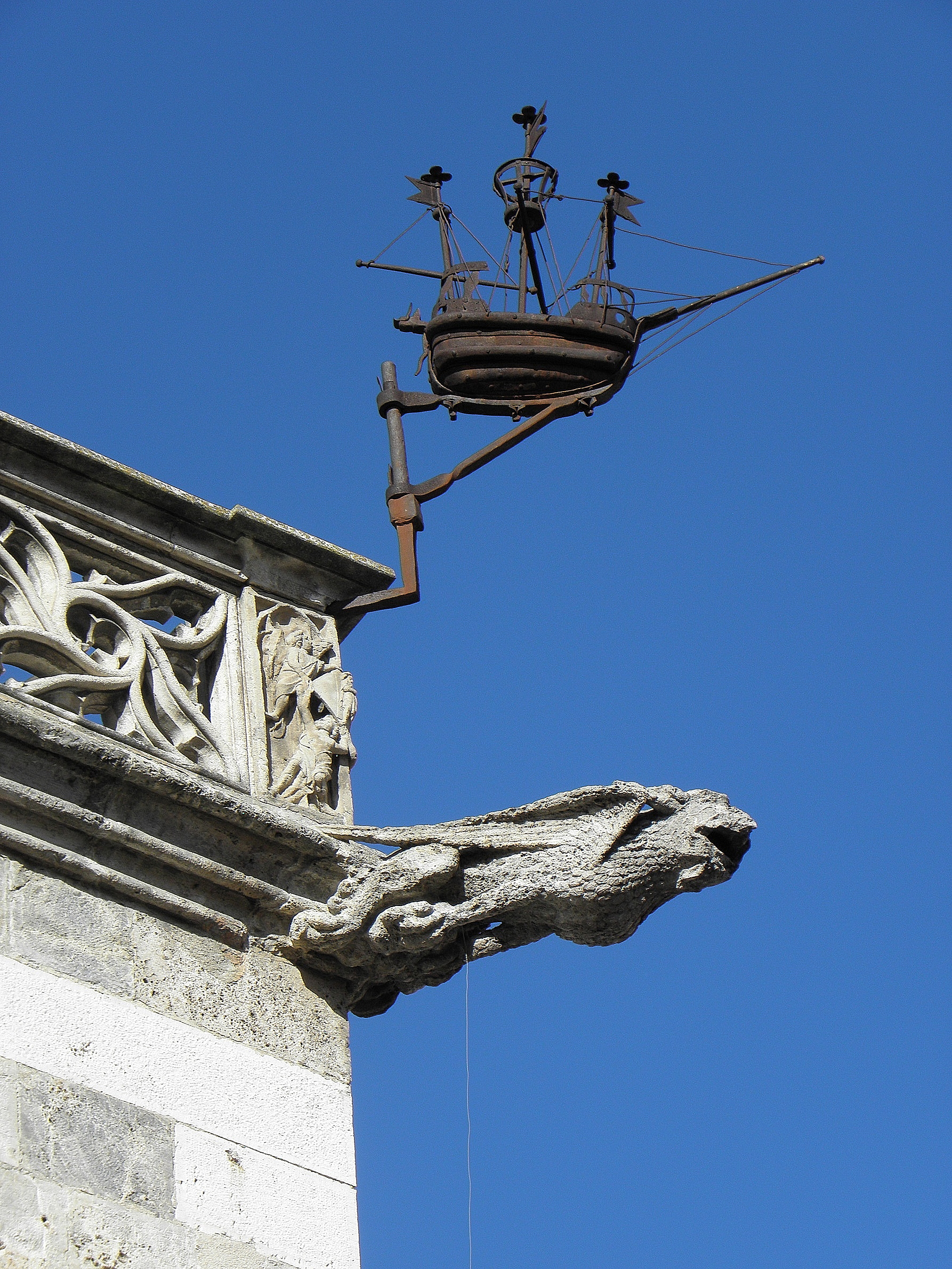 Loge de mer à Perpignan (66).